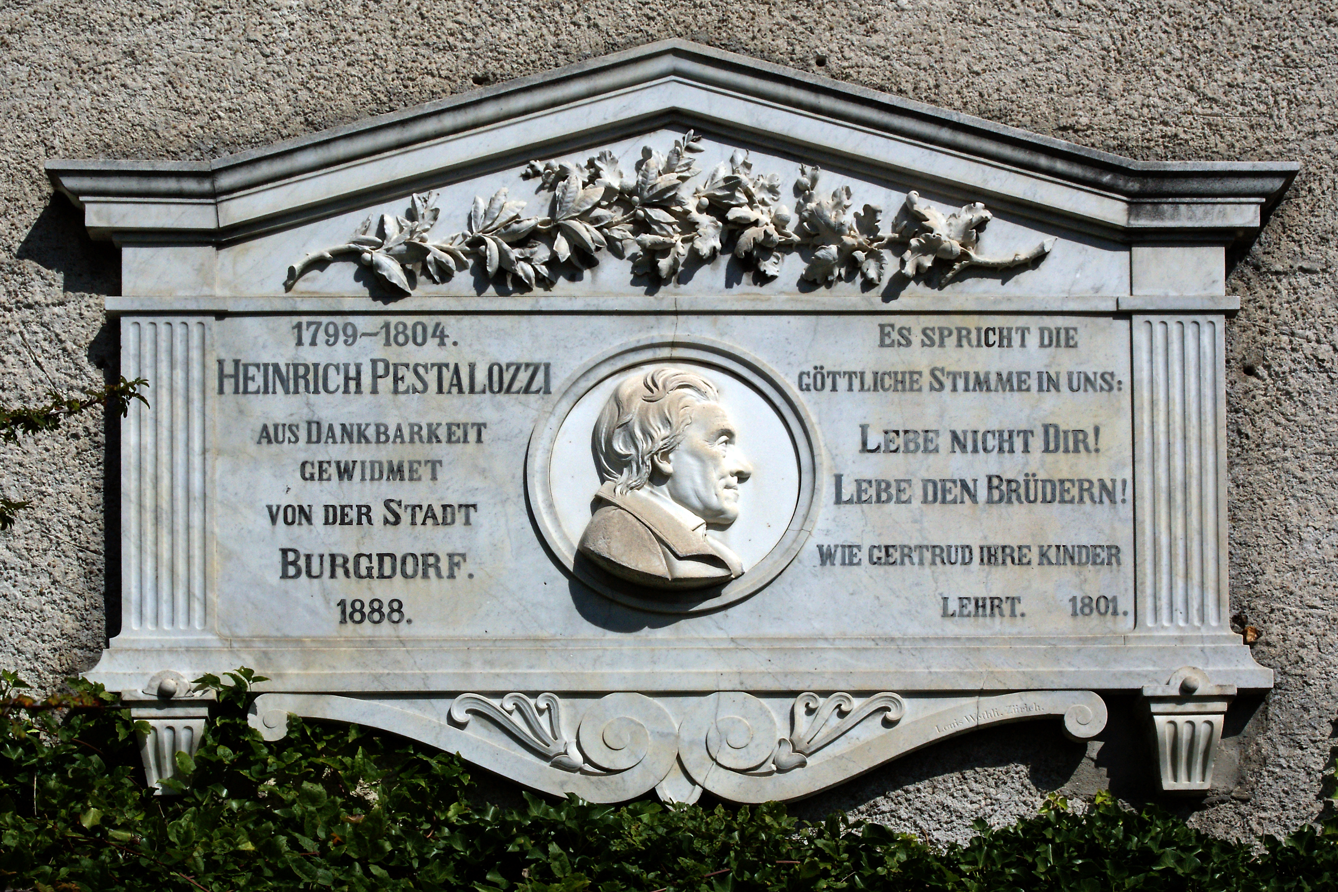 Erinnerungstafel an den Schweizer Erzieher Heinrich Pestalozzi im Vorhof des Schlosses Burgdorf (Kanton Bern)